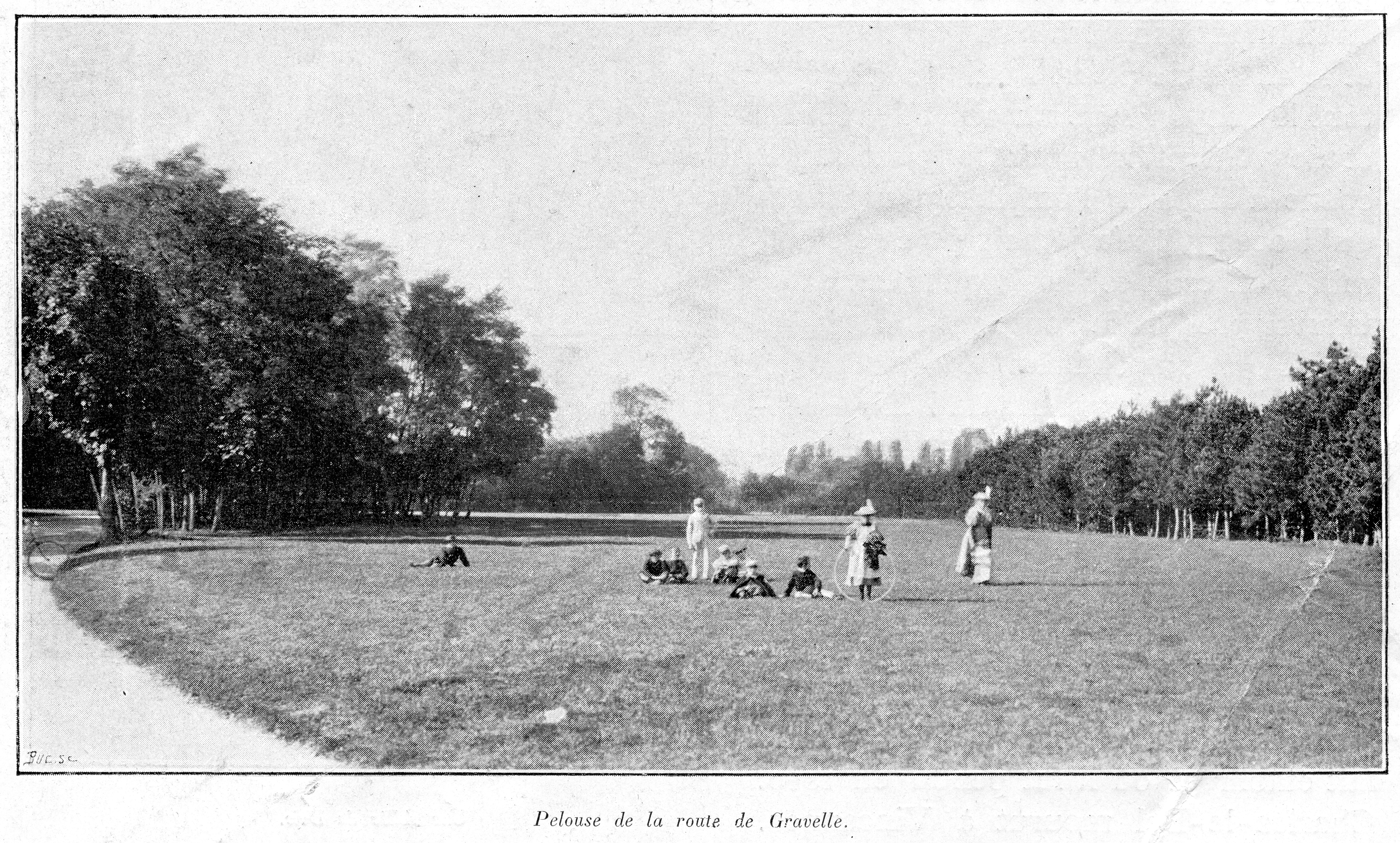 Clément Maurice Paris en plein air, BUC, 1897, Pelouse de la route de Gravelle